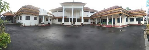 Balai Desa Patikraja